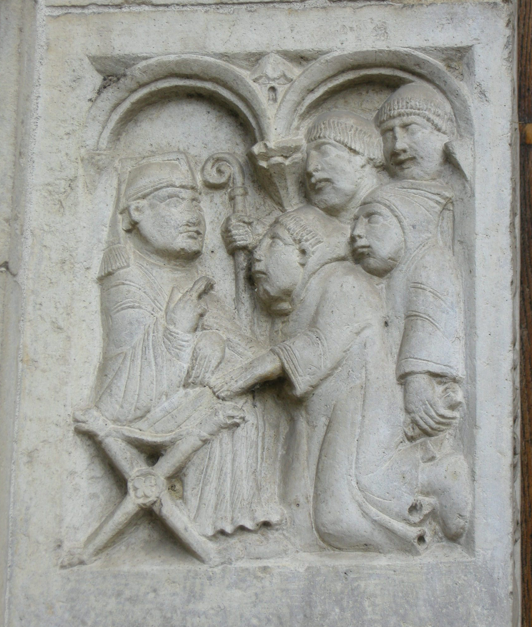 Abbazia di nonantola, portale di seguaci wiligelmo, stipite sx, formella 05 Stefano II benedice anselmo